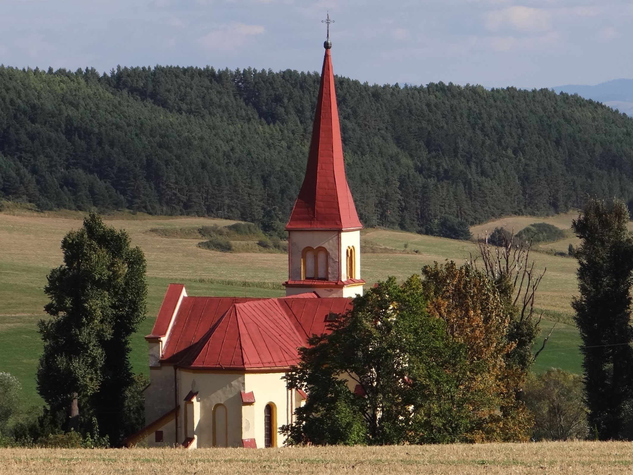 Jánovce